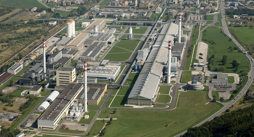 Fabrika Slovalco v Žiaru nad Hronom a Ladomerskej Vieske.